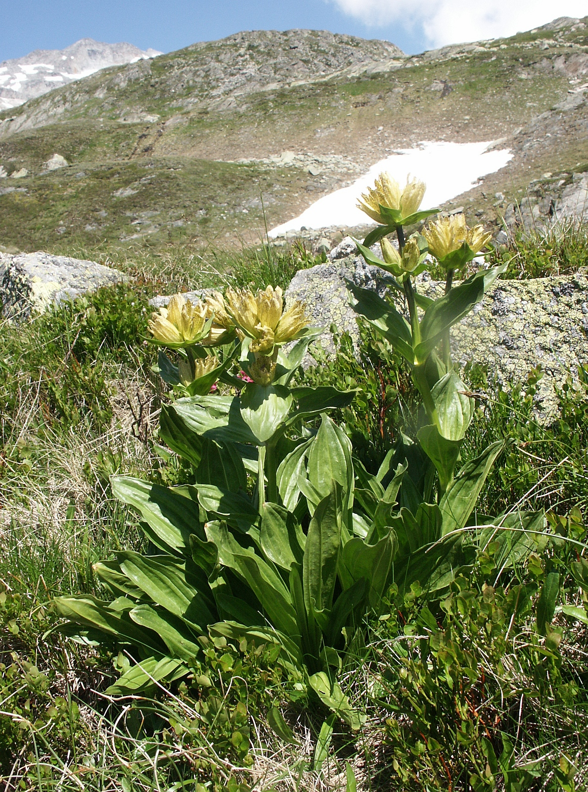 Gentiana puncata, Zillertaler Alpen, Italy